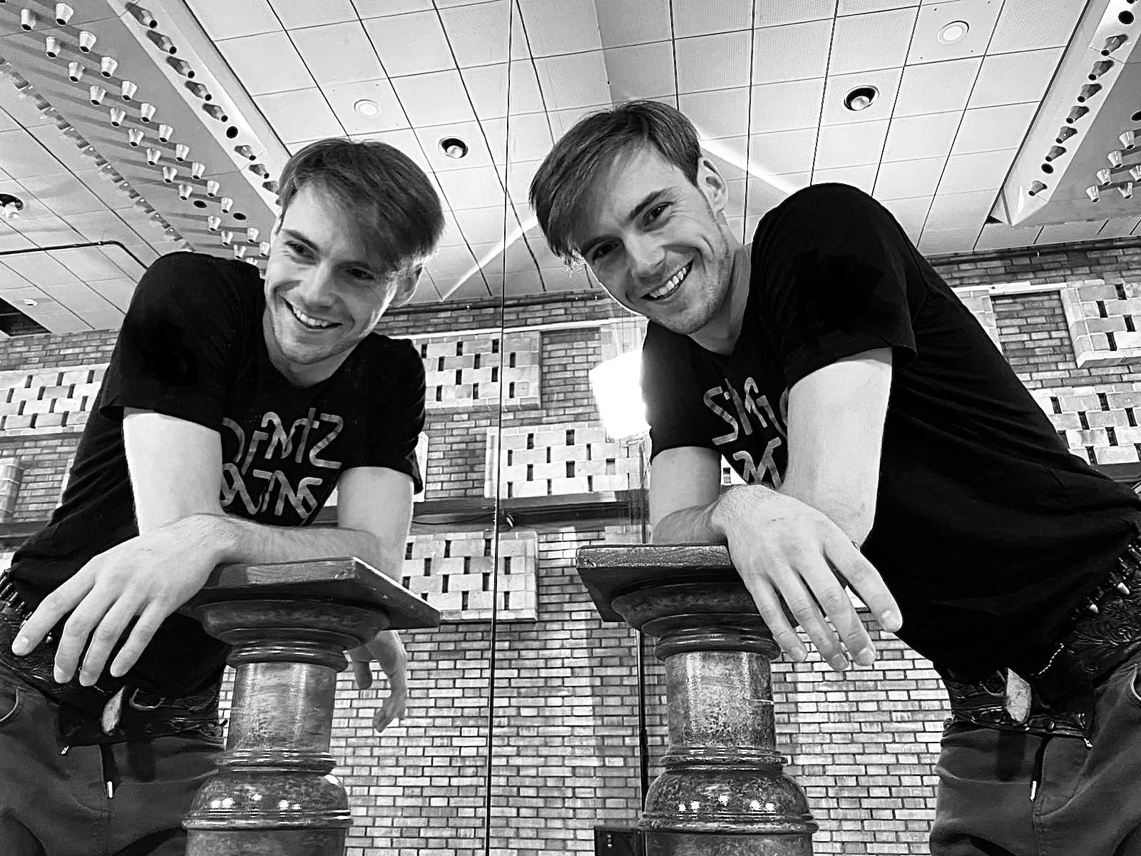 Portrét Dominika Vodičky